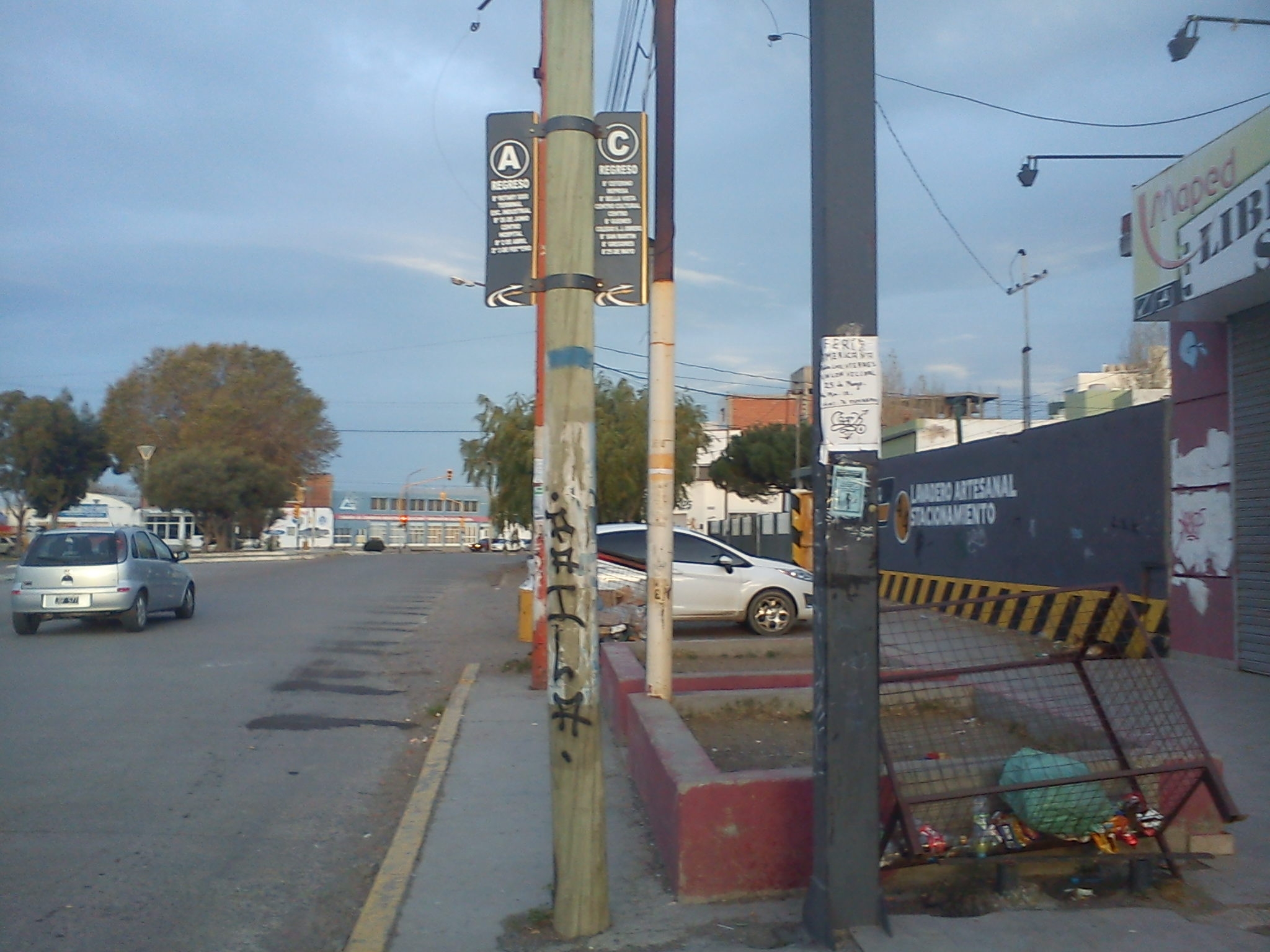 Parada de Autobuses Caleta Olivia